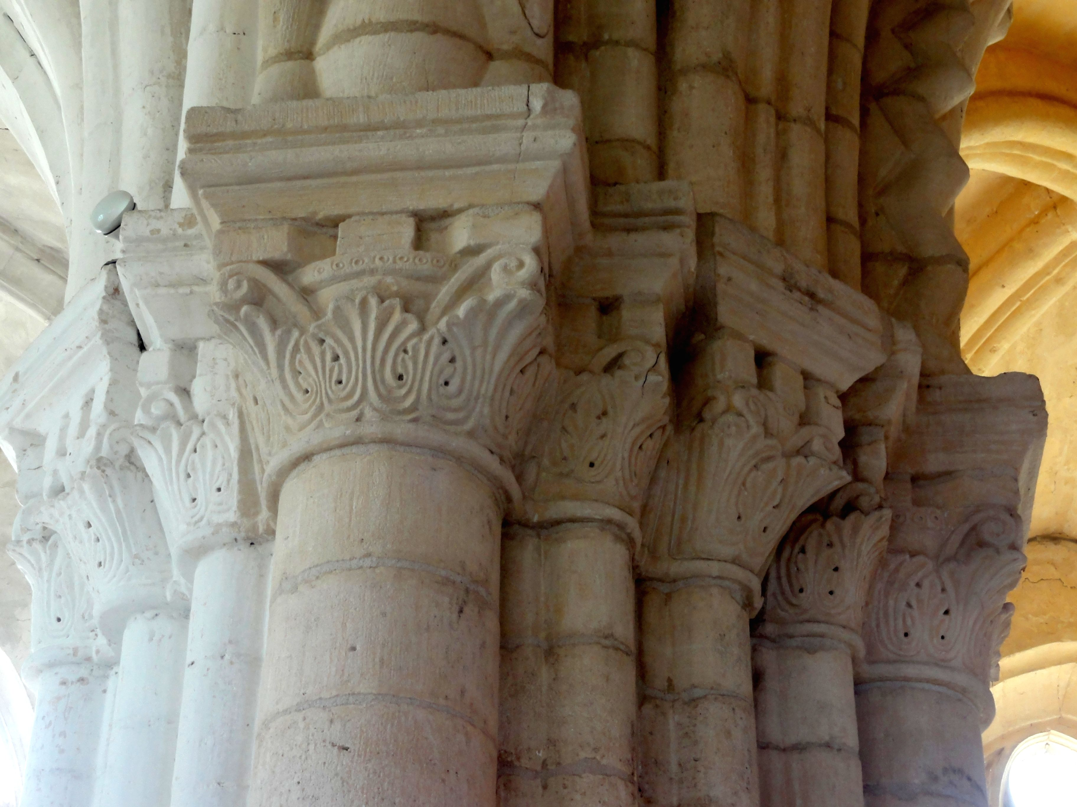 Croisée, arcade vers le chœur, chapiteaux côté sud (pile SE de la croisée).